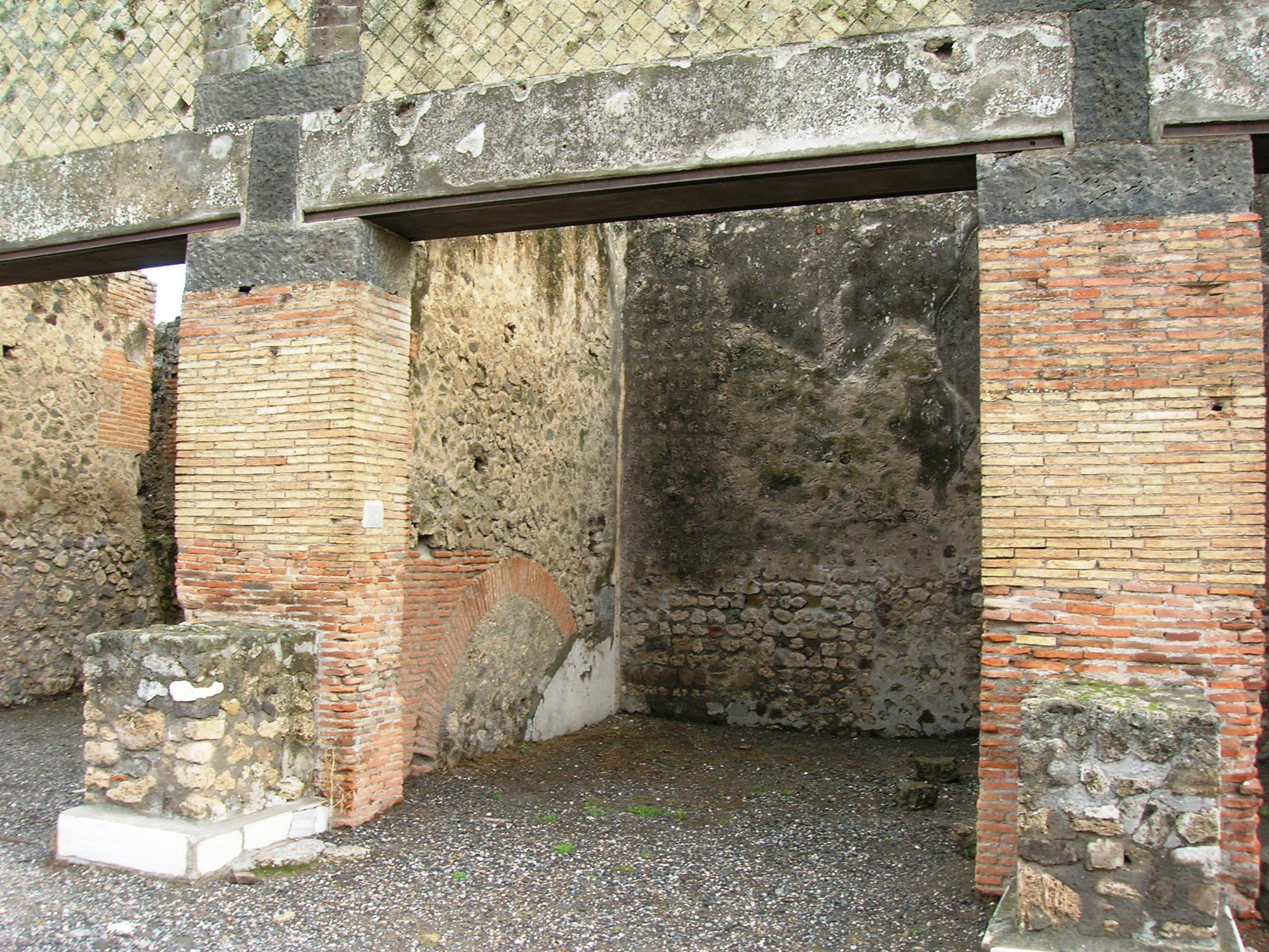 Bottega esterna al Macellum